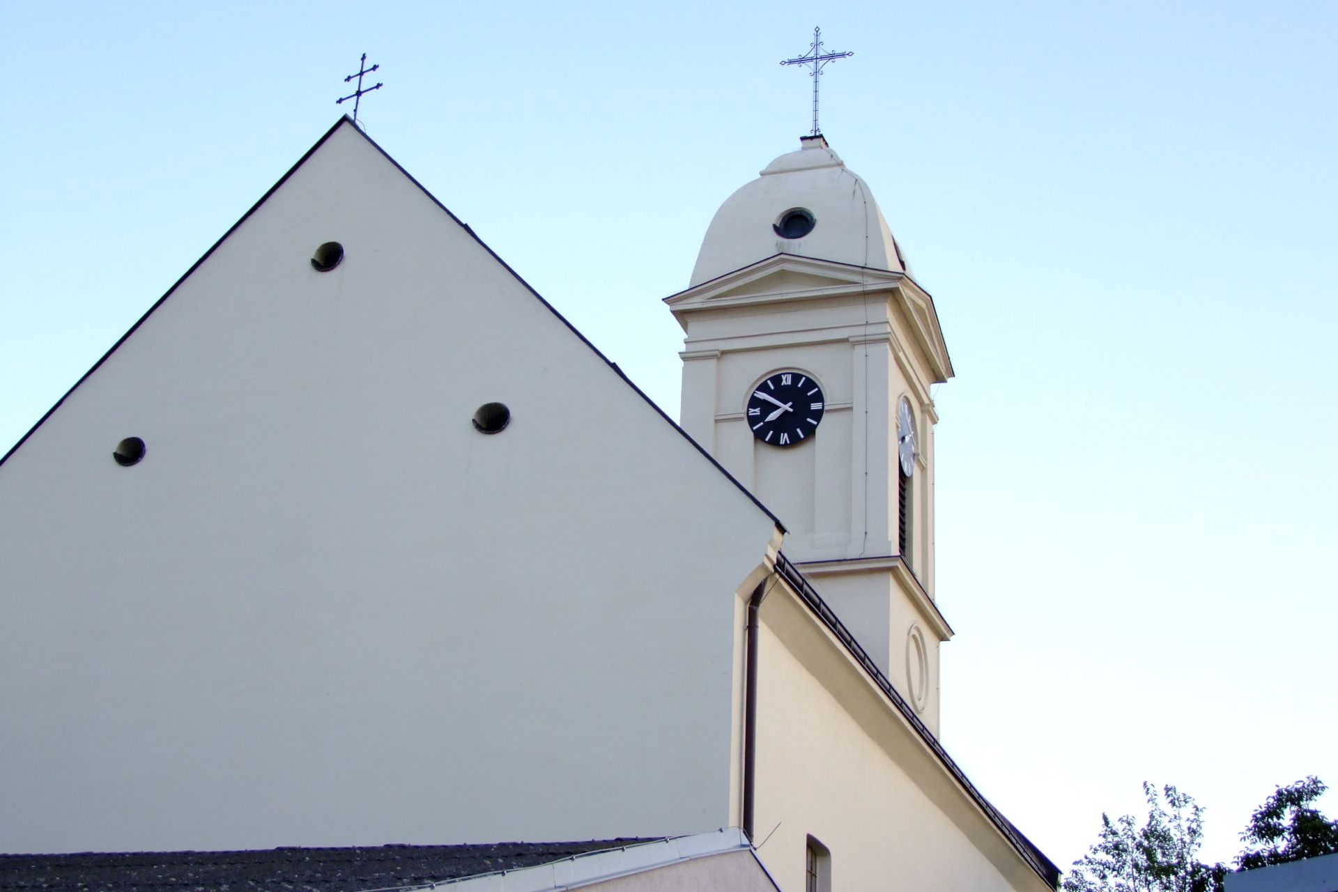 Evang. Pfarrkirche A.B.